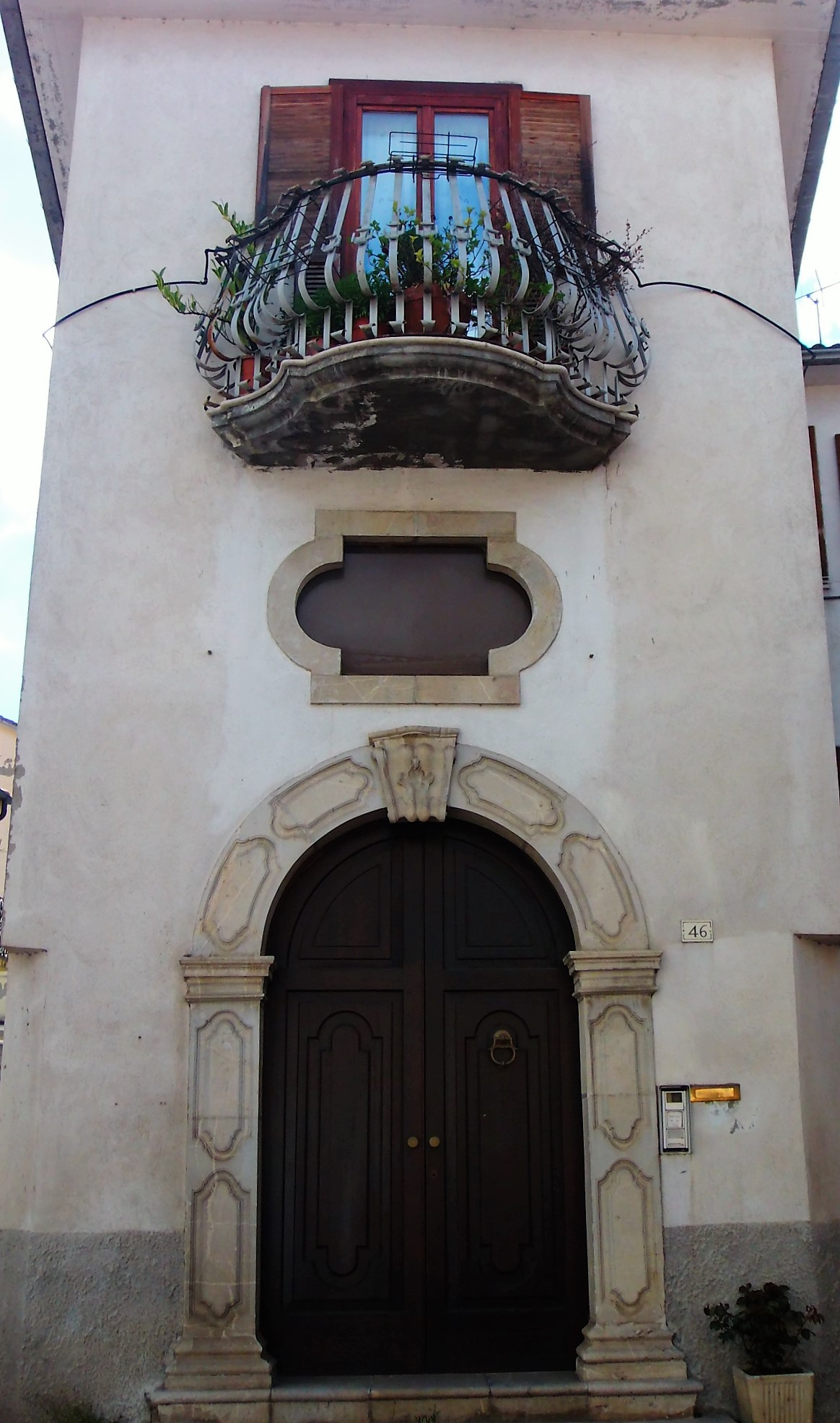 Potale Severino